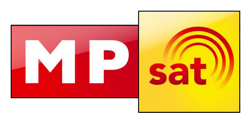 Лого на Македонско Радио Сат